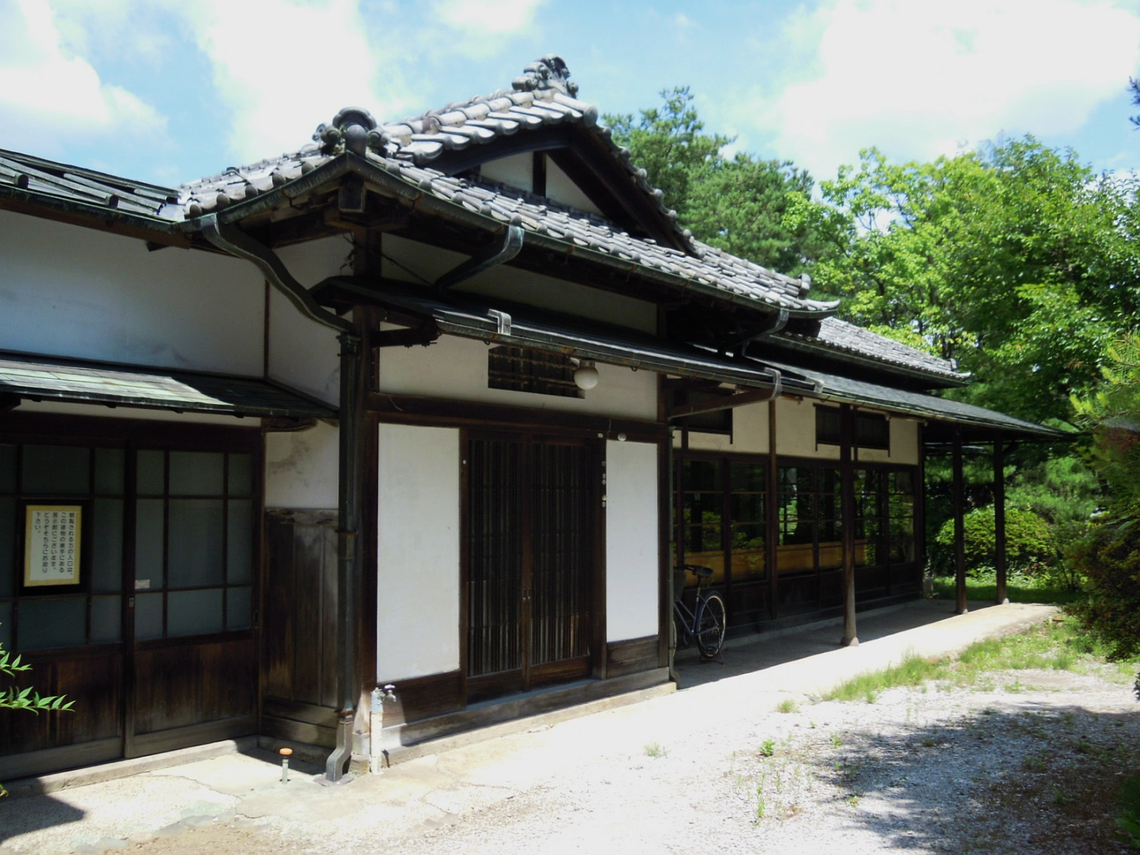 岩手県奥州市にある齋藤實旧宅